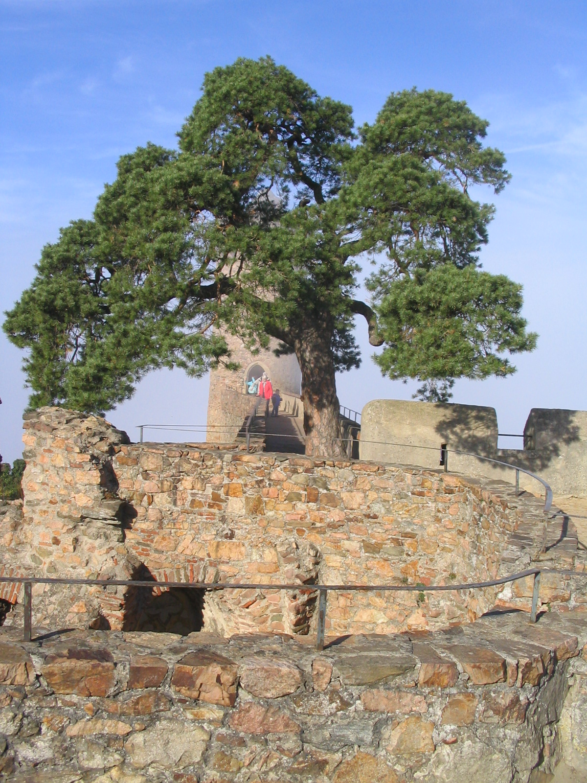 Kiefer auf der Burgmauer von Schloss Auerbach bei 64625 Bensheim, Germany own foto 27.10.2005